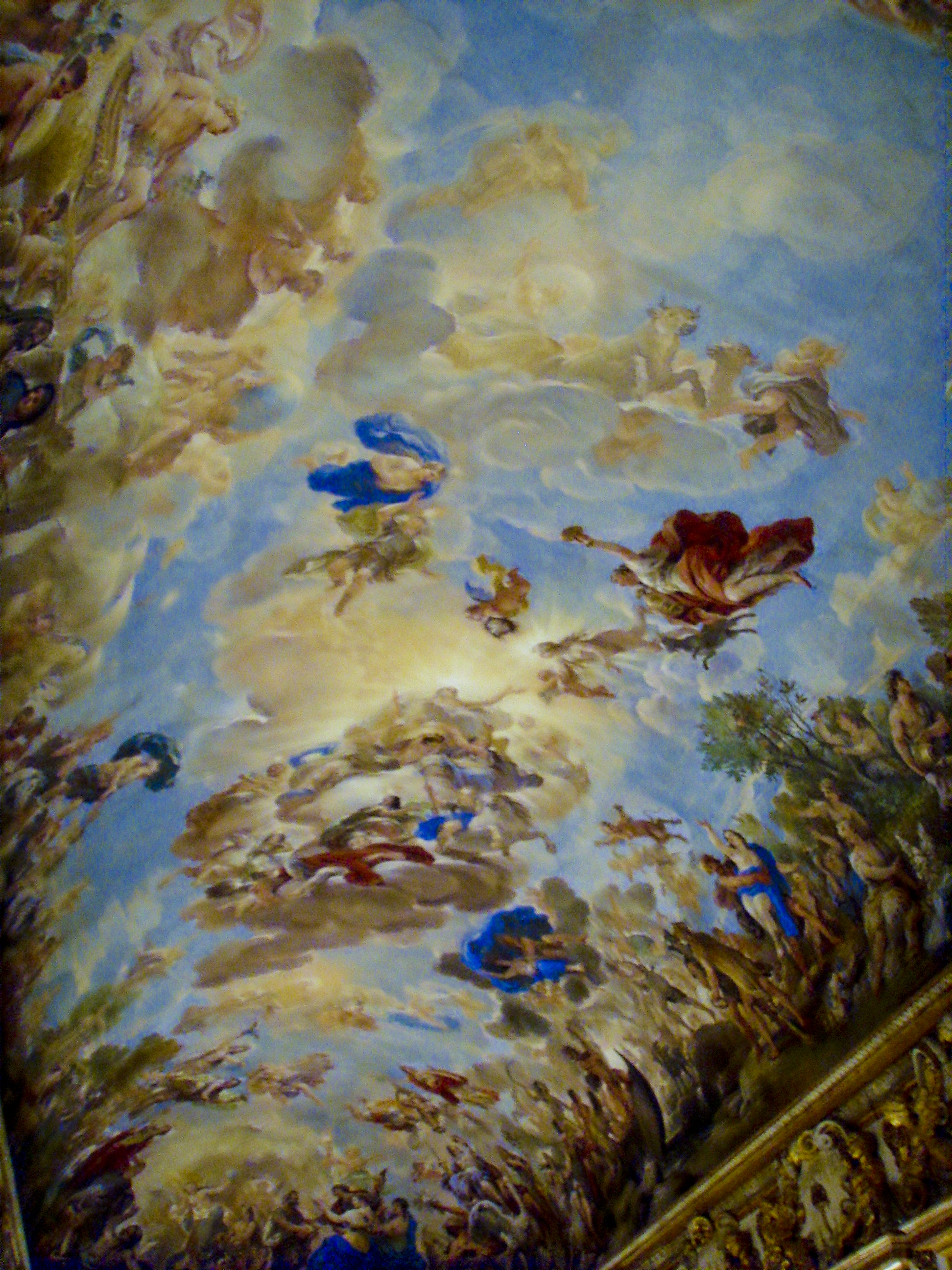 Palazzo Medici Riccardi in Florence, Italy: Gallery frescoed by Luca Giordano.